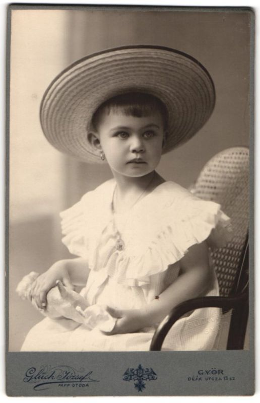 József Glück Kleines Mädchen mit Strohhut